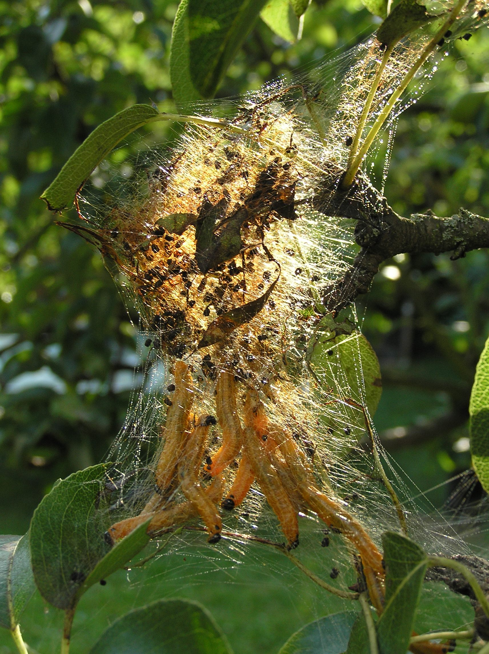 Neurotoma saltuum (synonym: Neurotoma flaviventris), Waiblingen